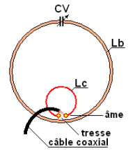 Schéma antenne cadre magnétique